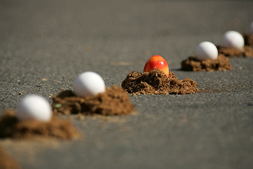 Eierleset in Arlesheim: gesetzte Eier auf der Laufstrecke